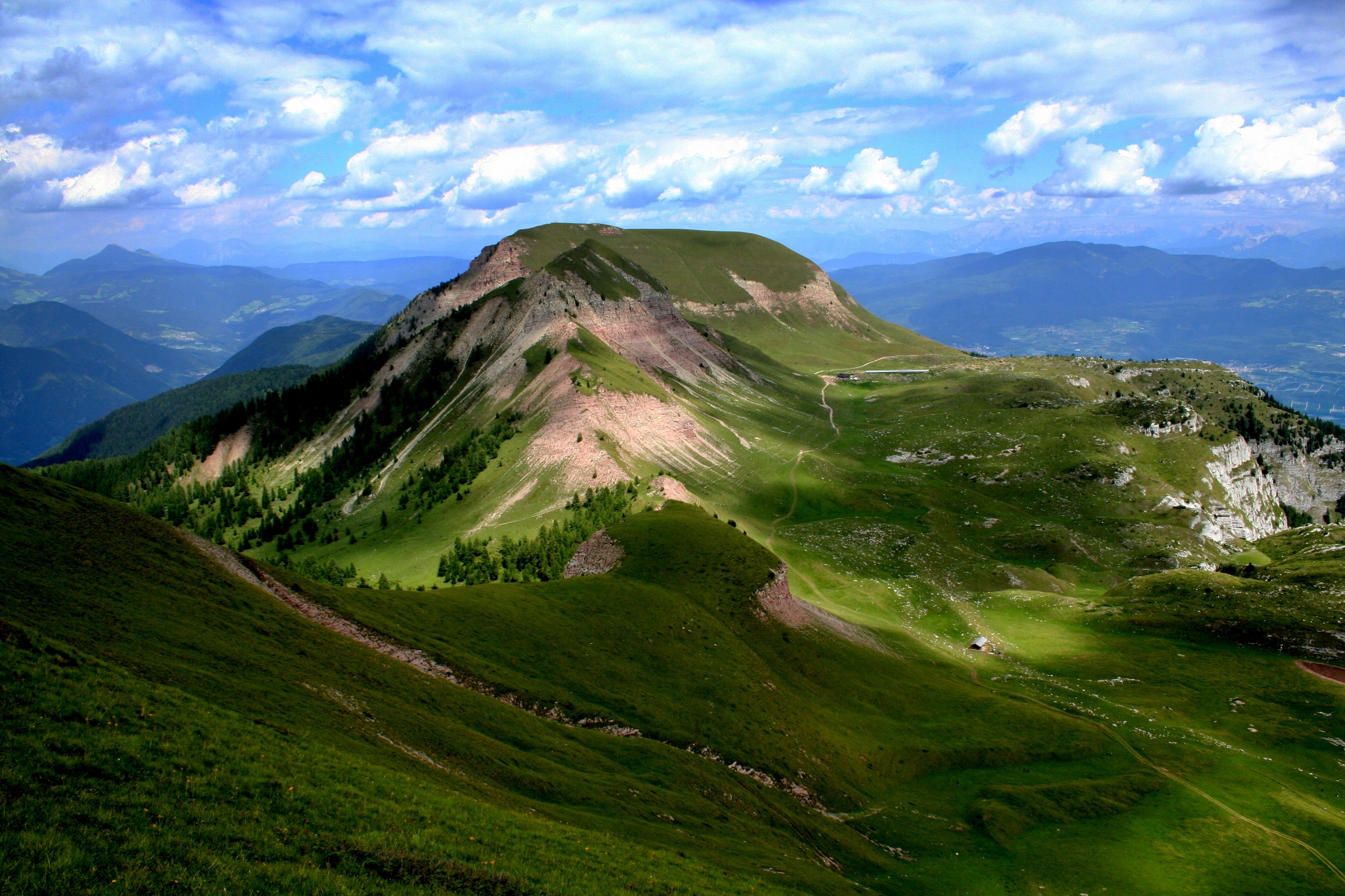 Parco naturale provinciale dell'Adamello-Brenta (Q769604)